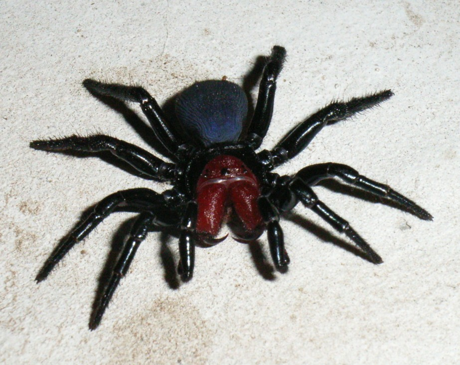 Male Mouse Spider - Missulena occatoria